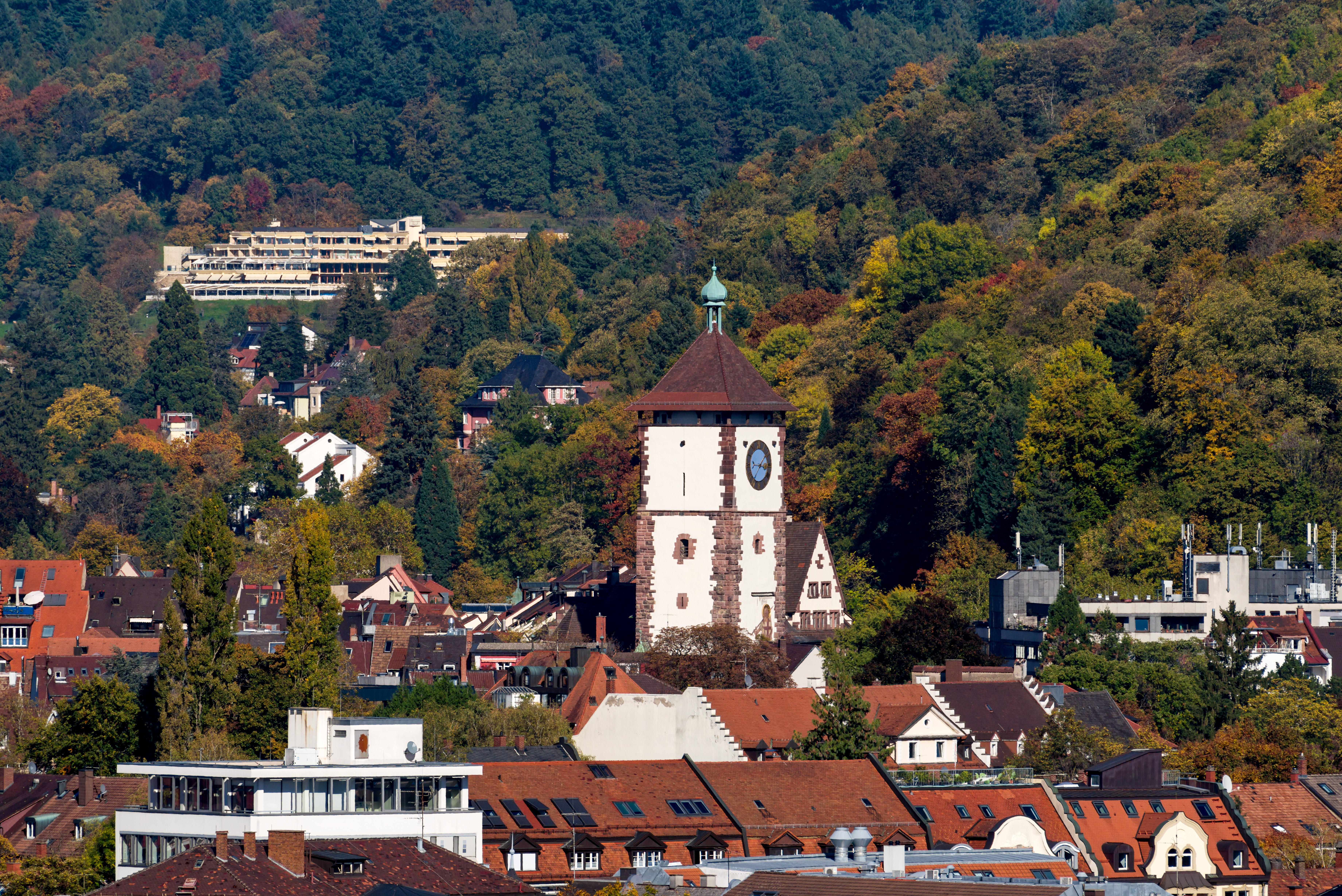 Bilder aus Niederschopfheim Brunnen